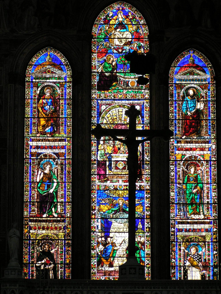 Stained-glass windows at Tornabuoni Chapel in Santa Maria Novella, Florence, Italy Vidrieras en la capilla Tornabuoni, Santa María la Nueva, Florencia, Italia